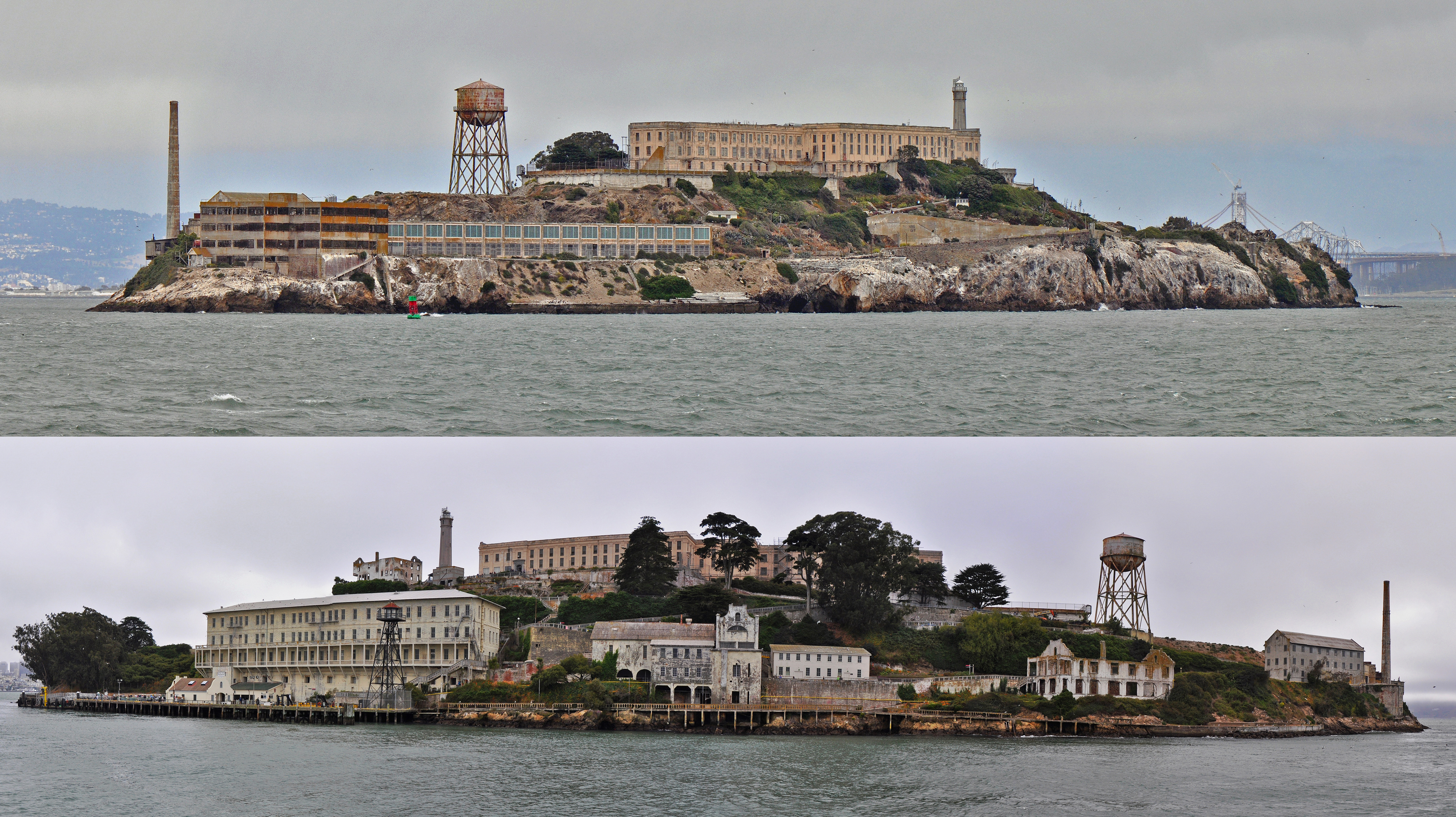 Panorama dei due lati di Alcatraz visti dal battello, Agosto 2011